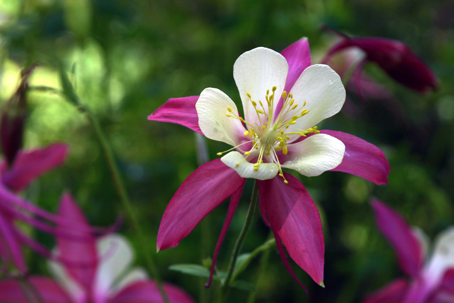 Aquilegia